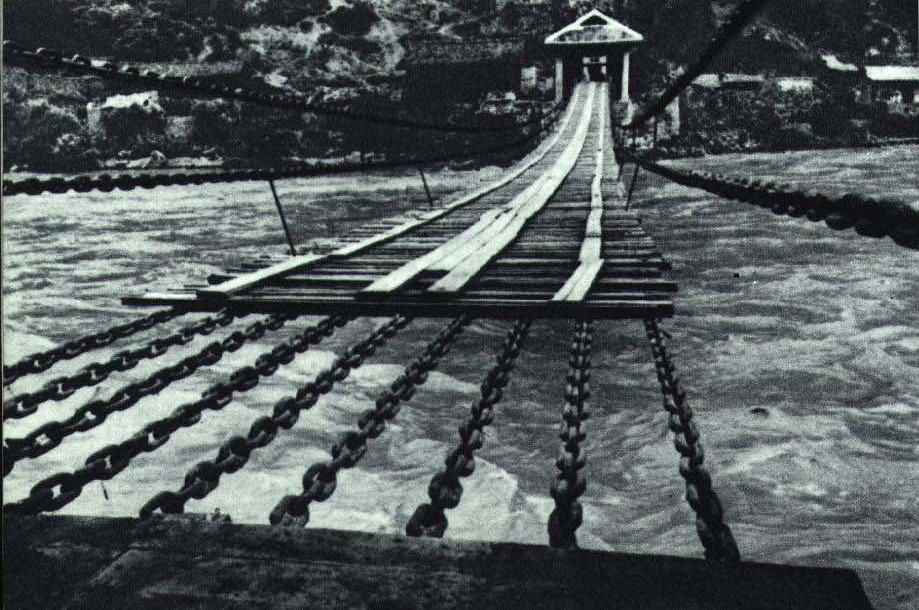 1967-10 红军时期泸定桥